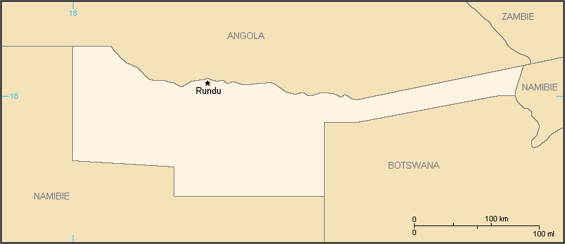 Description:Carte du Kavangoland Auteur:Rémih